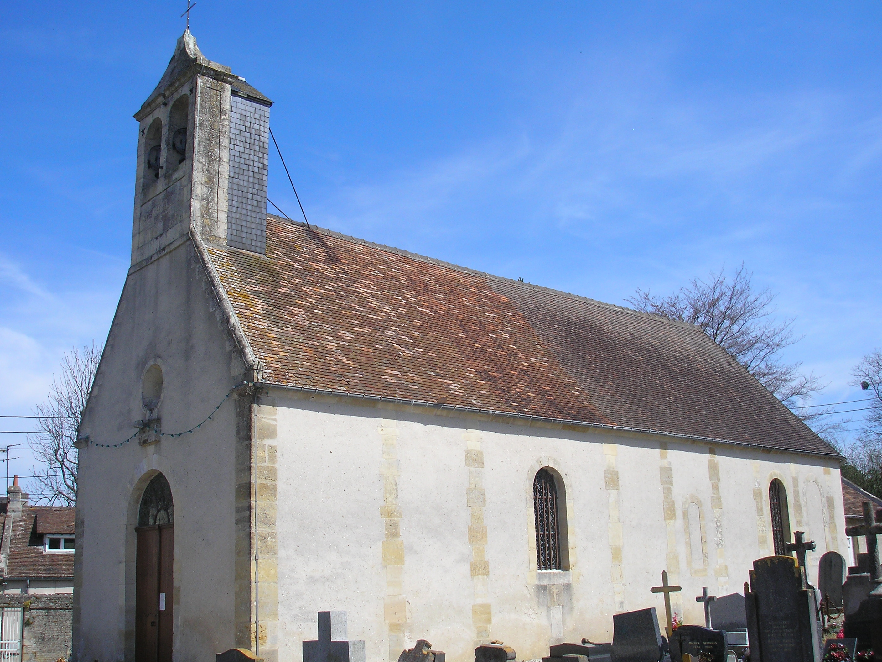 Sallenelles (Normandie, France). L'église de l'Assomption-de-Notre-Dame.